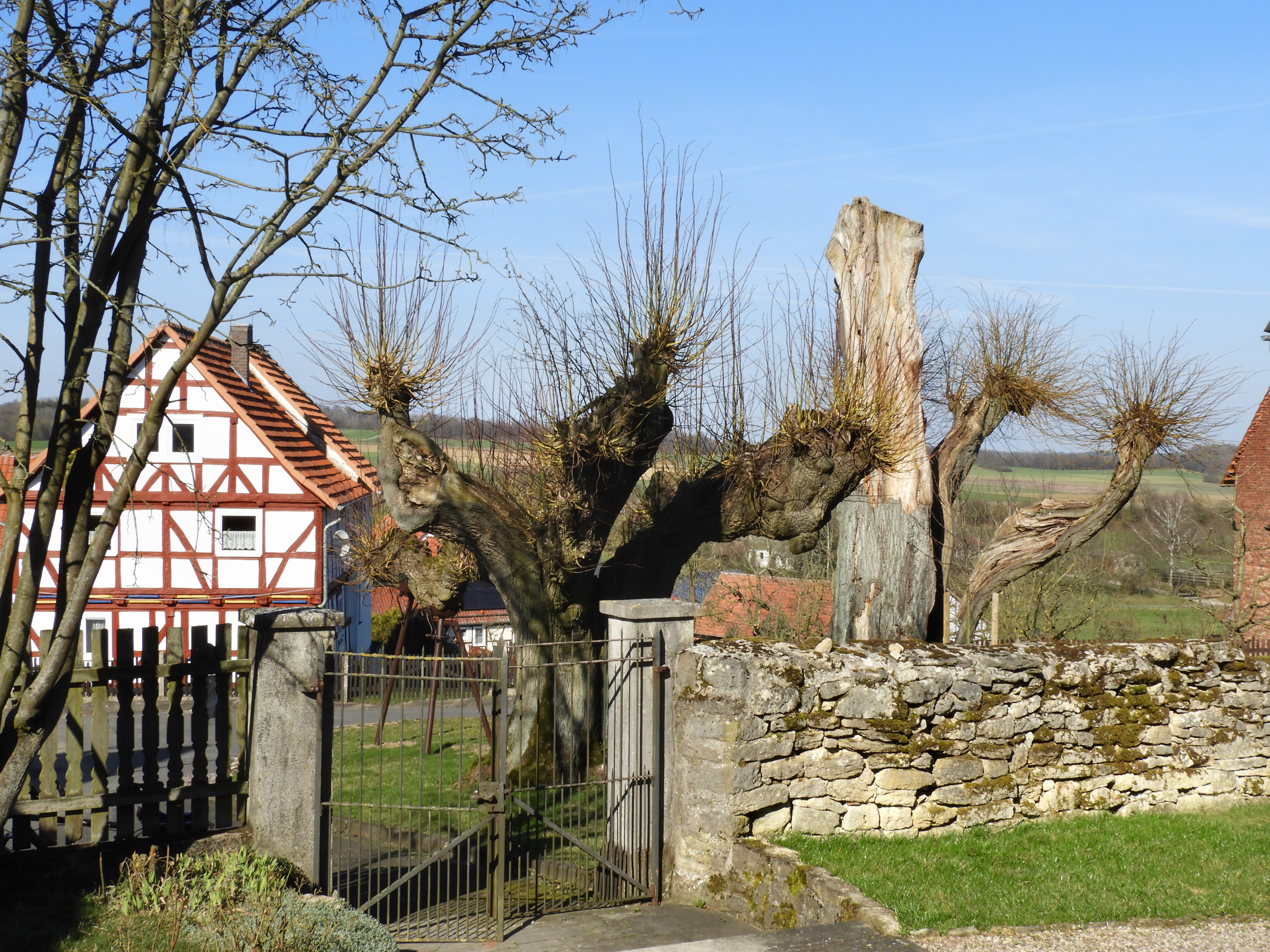 Der Dorfanger Archfelds mit den zwei Linden, deren Alter auf 300 bis 450 Jahre geschätzt wird, befindet sich unterhalb der Kirche. Als einer der besterhaltenen Anger des Kreisgebietes ist die Anlage aus ortsgeschichtlichen Gründen als Kulturdenkmal erhaltenswert. Die beiden alten Archfelder Dorflinden werden als Naturdenkmale besonders geschützt. Archfeld ist ein Ortsteil der Gemeinde Herleshausen im nordhessischen Werra-Meißner-Kreis.